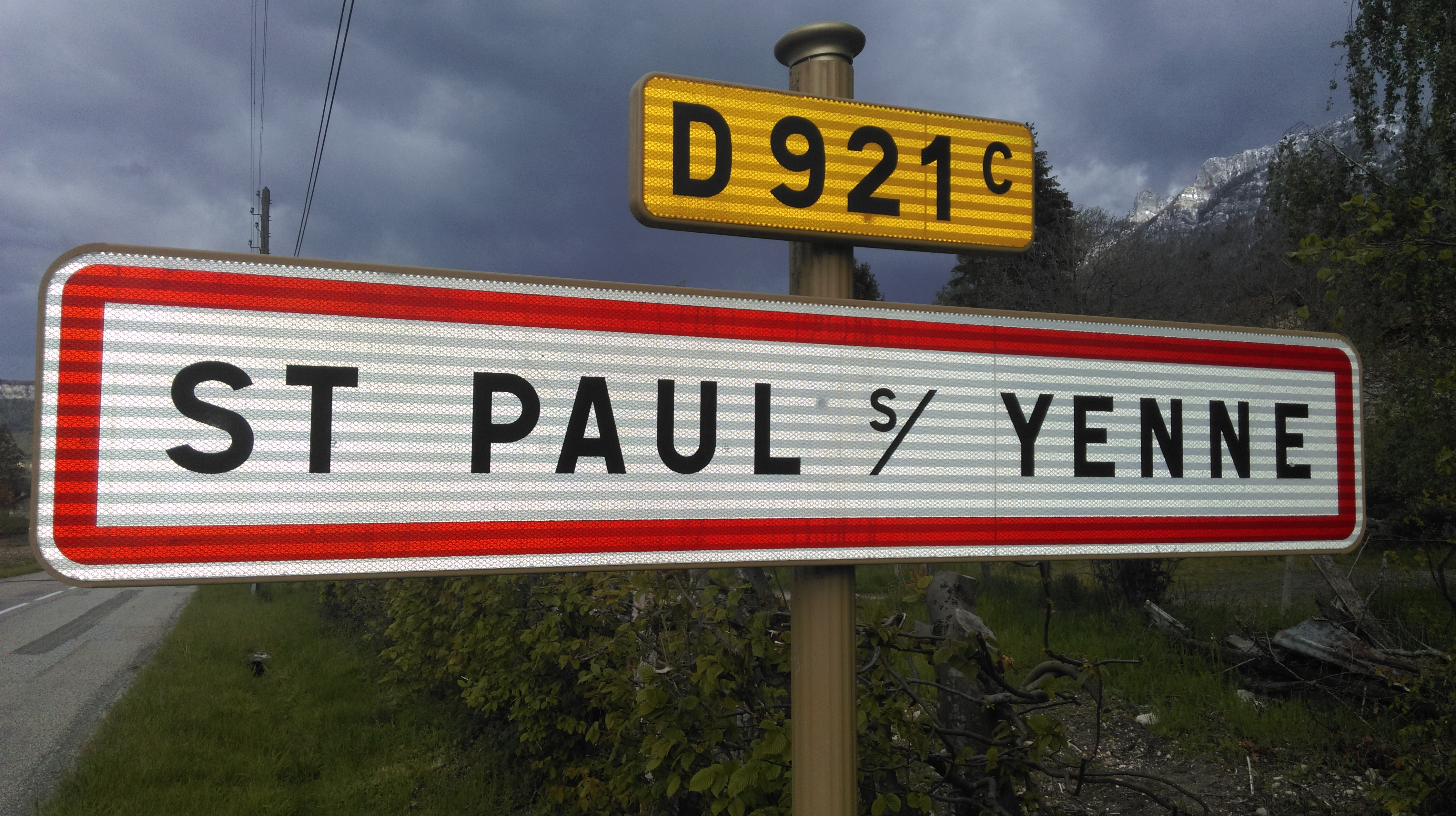 Panneau d'entrée de village Saint-Paul-sur-Yenne